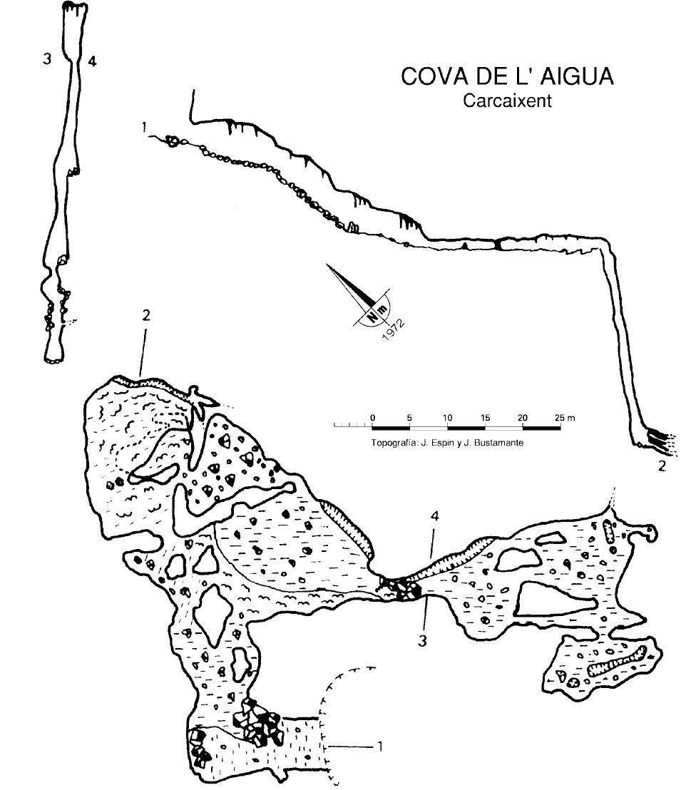 topografía de la Sima de l'Aigua